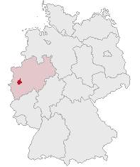 Rhein-Kreis Neuss, North Rhine-Westphalia, Germany